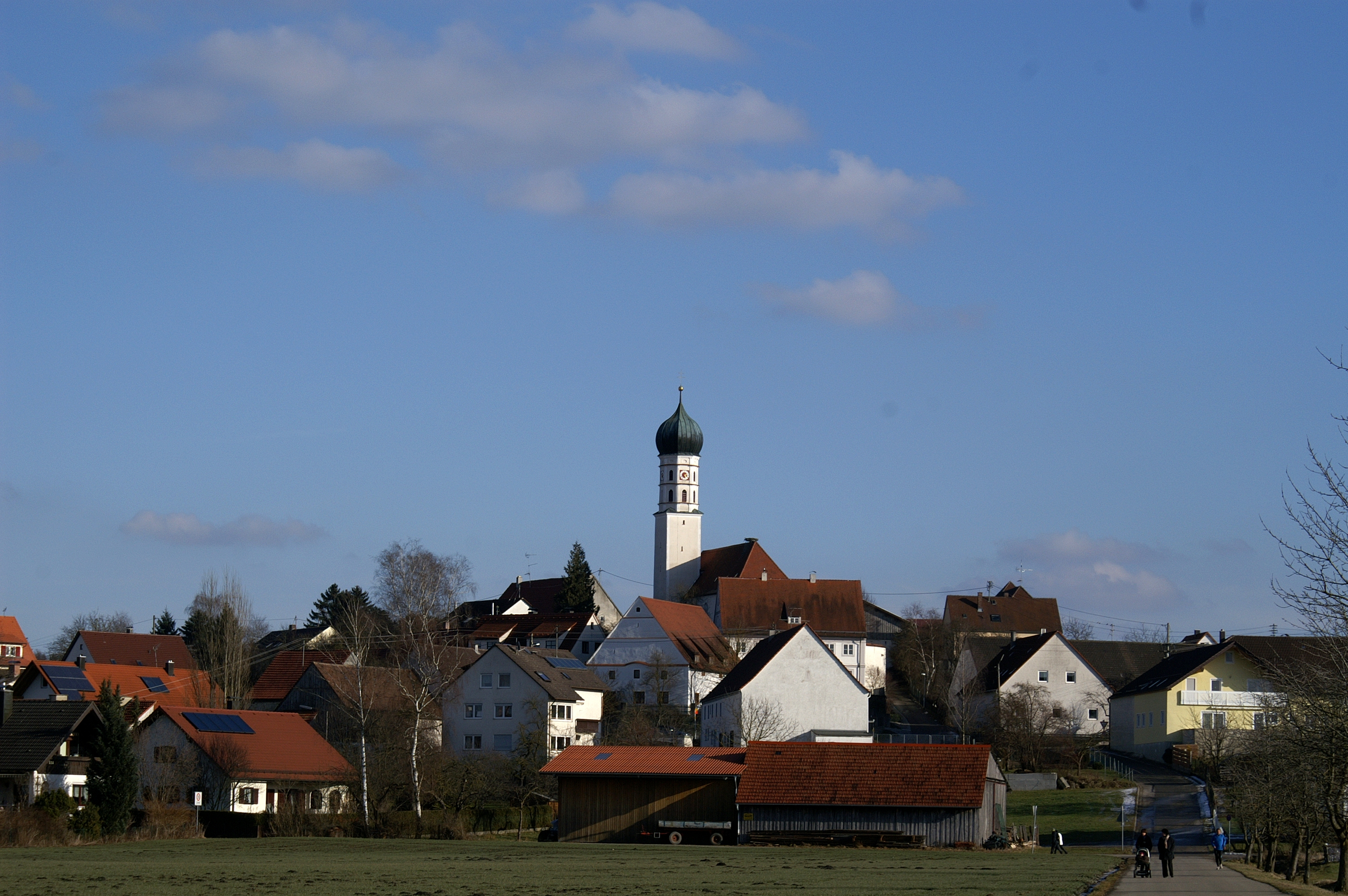 Der Neu-Ulmer Stadtteil Finningen